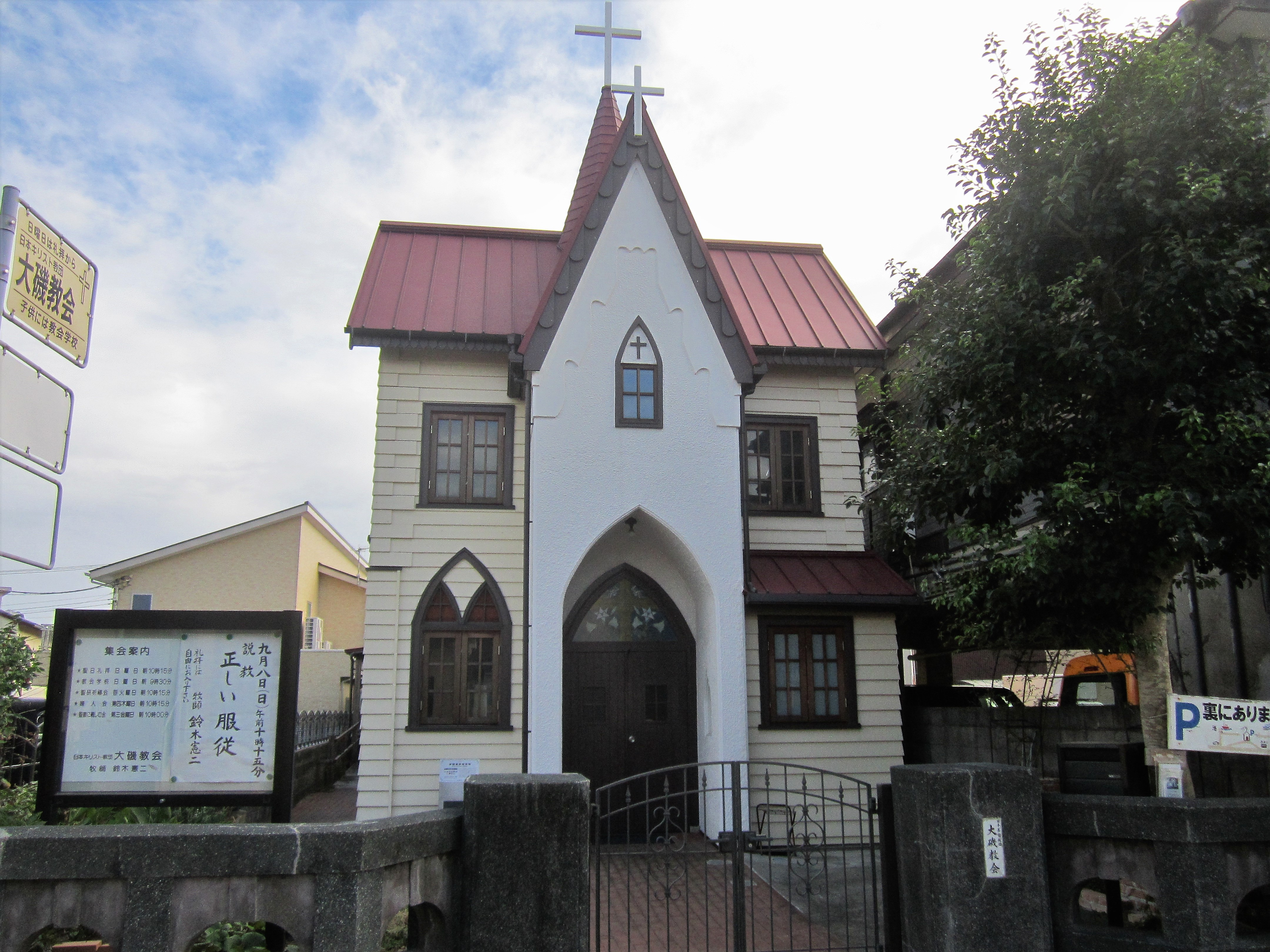 日本基督教団大磯教会（大磯町大磯字茶屋町）